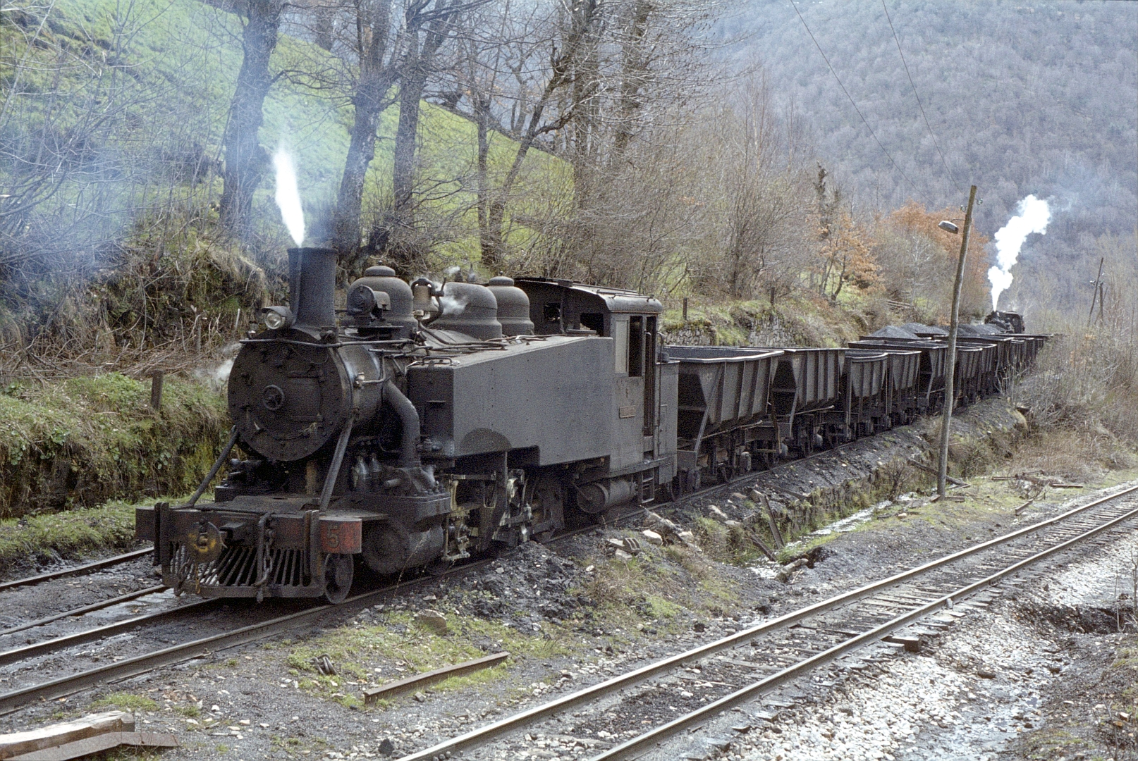 Manœuvres de wagons de charbon à la zone de chargement de Caboalles de Arriba, avec la 131 T Baldwin N°5 et la 132 T Engerth N°17 au mois d'avril 1983.